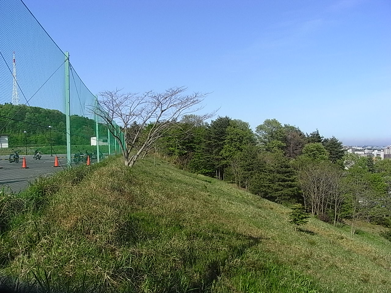 Mogasaki Yokoanoabogun Site. Sendai, Miyagi prefecture, Japan.